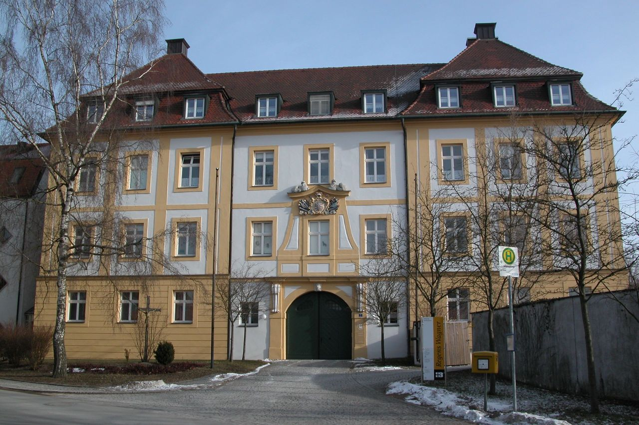 Schloss Absberg, Vogtei des Deutschen Ordens